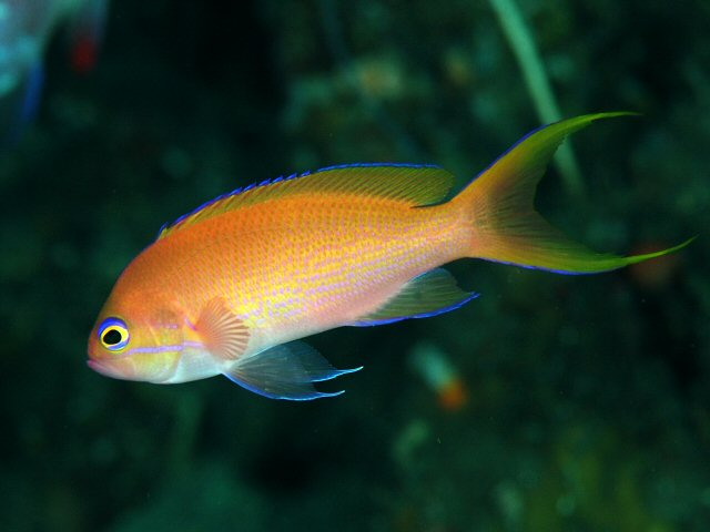 ナガハナダイ♀ Pseudanthias elongatus